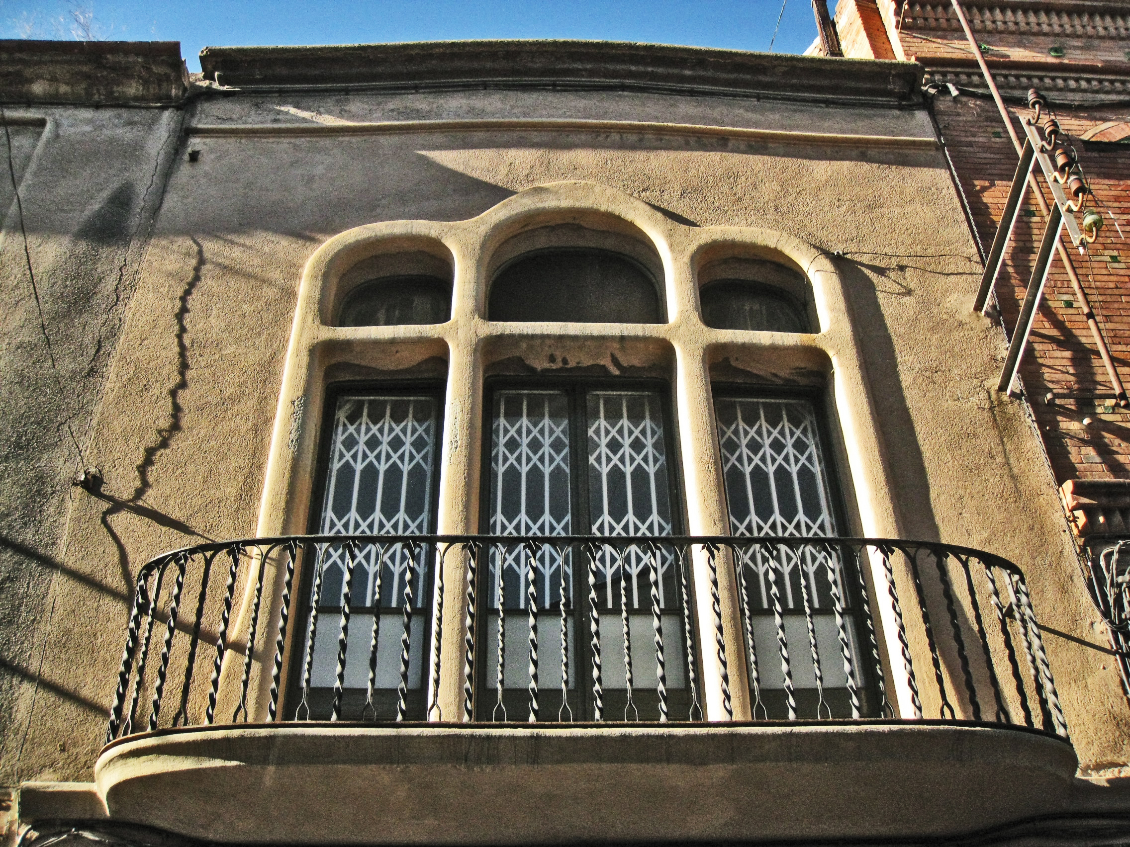 Magatzem Emili Matalonga, al carrer de Sant Pau núm. 9 (Terrassa). Edifici modernista de Lluís Muncunill, del 1911. Detall del balcó.